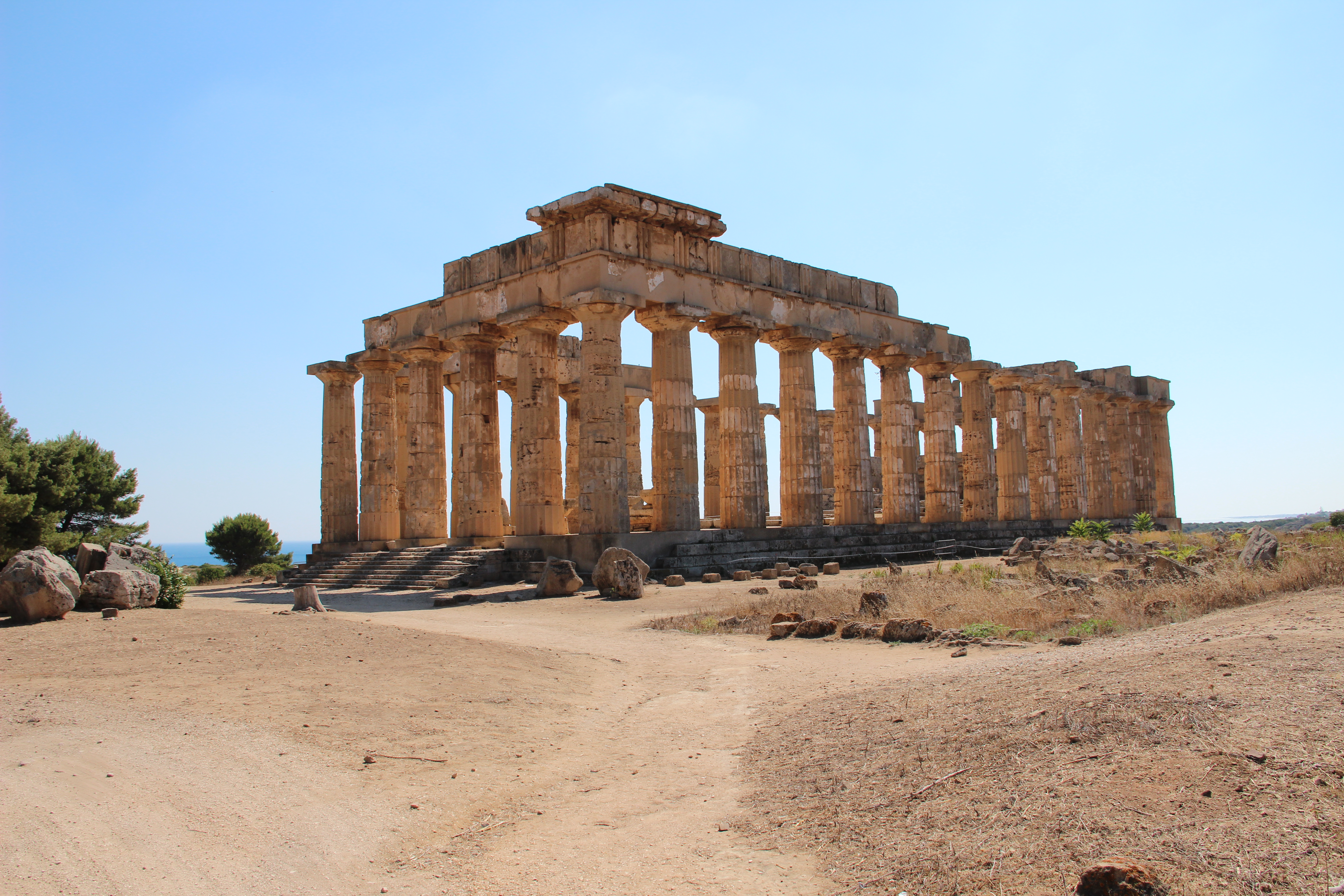 91022 Marinella di Selinunte, Province of Trapani, Italy